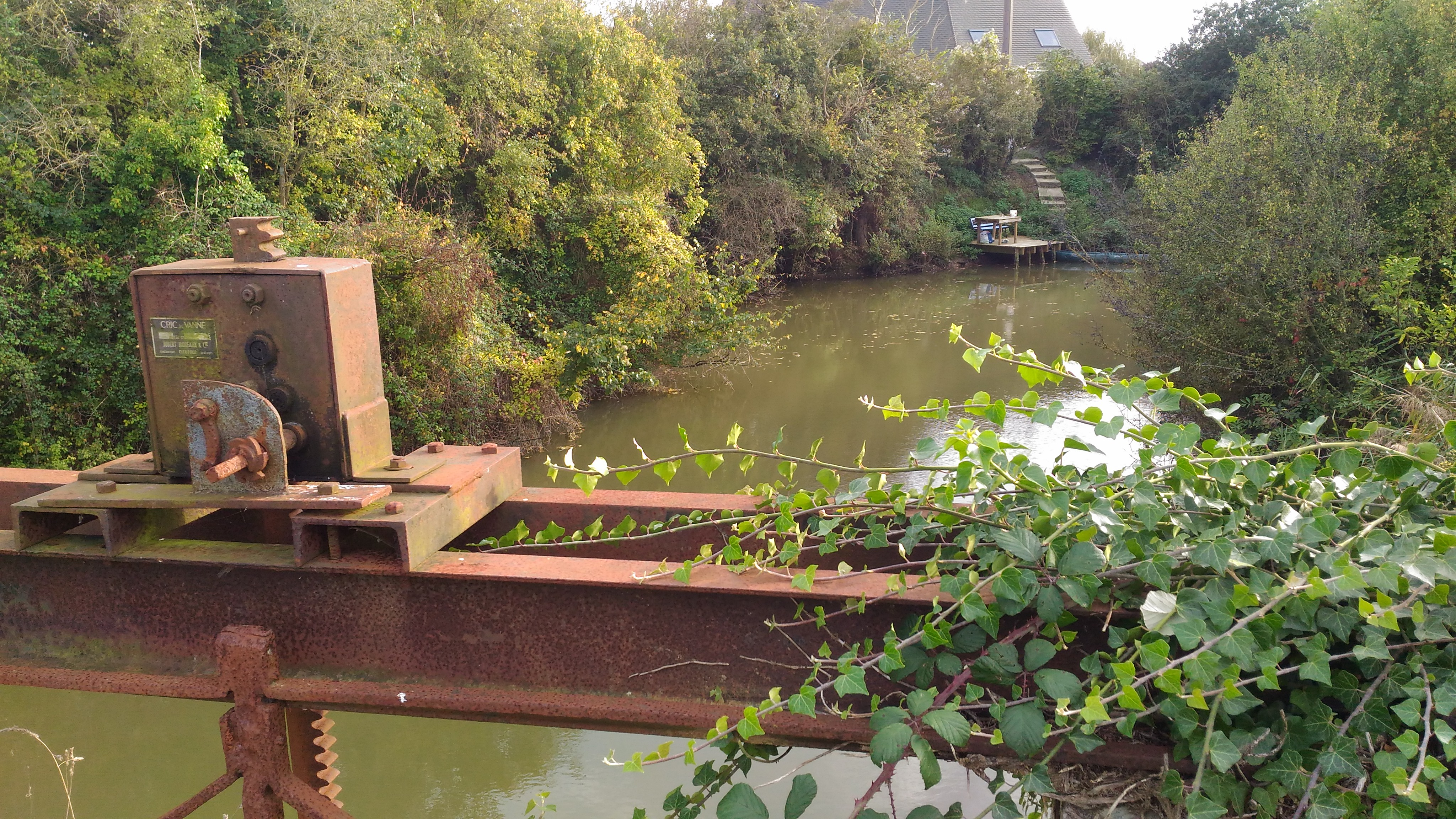 Au marais de dives sur mer (#100wikicommonsdays r 2 d 79)